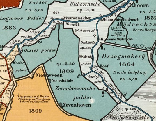 Blokland bij Mijdrecht